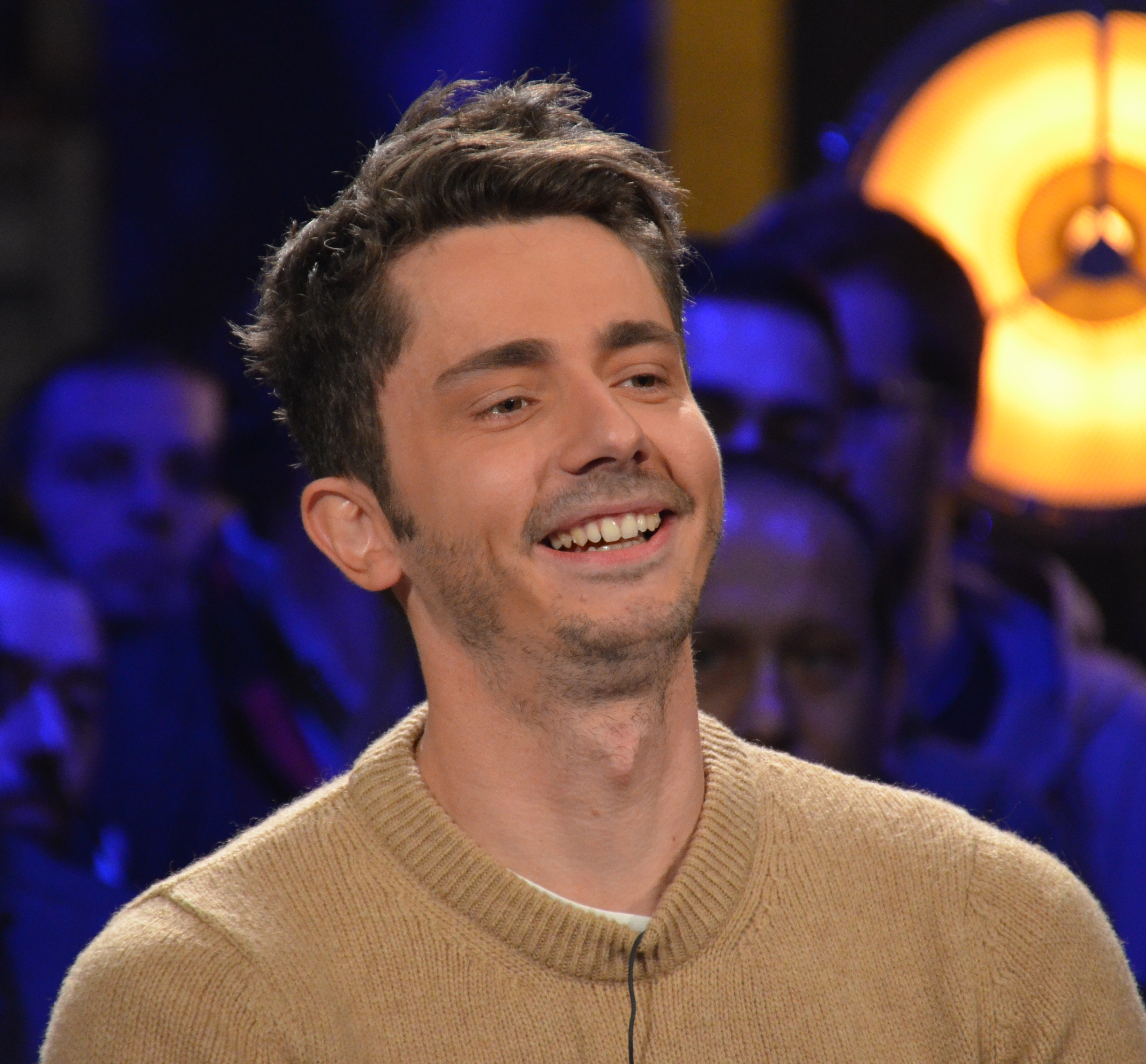 Guillaume Pley sur le plateau de Top Gear France en 2018